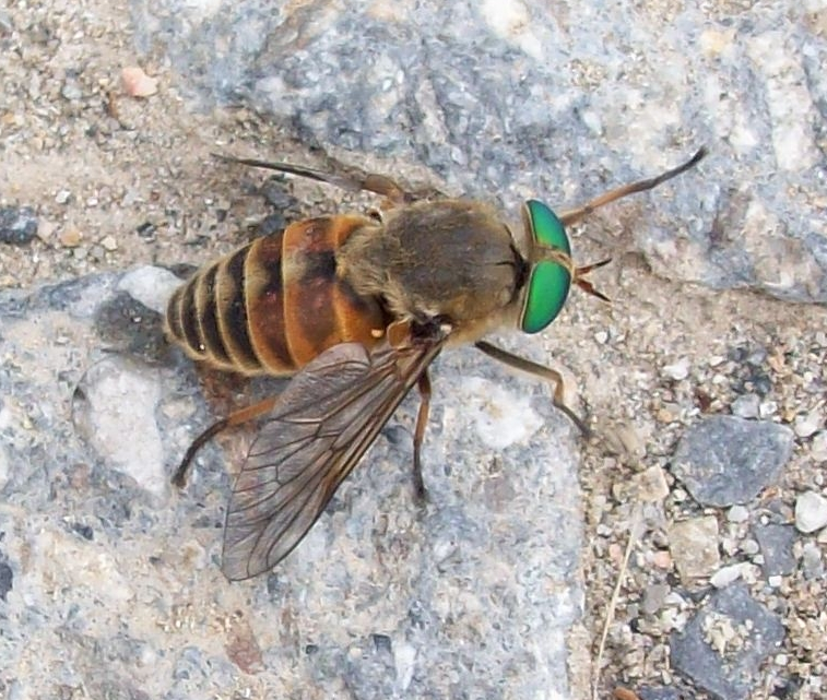 Wahrscheinlich eine Gemeine Viehbremse (Tabanus bromius) (Bild 2 / 2). Fundort: Lingueglietta, Ligurien (Italien). Dazu gehört Bild (1/2).